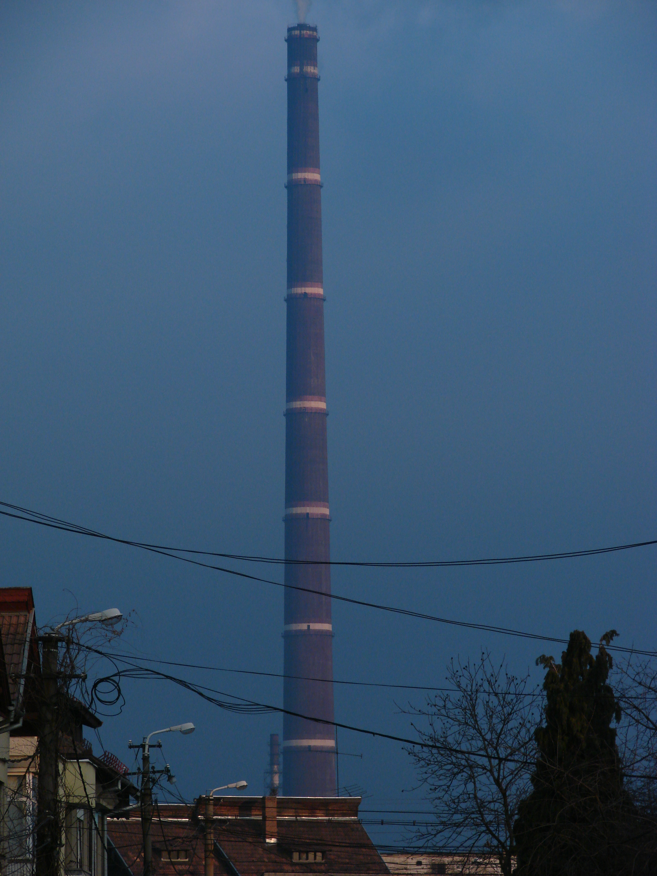 Phoenix Copper Smelter